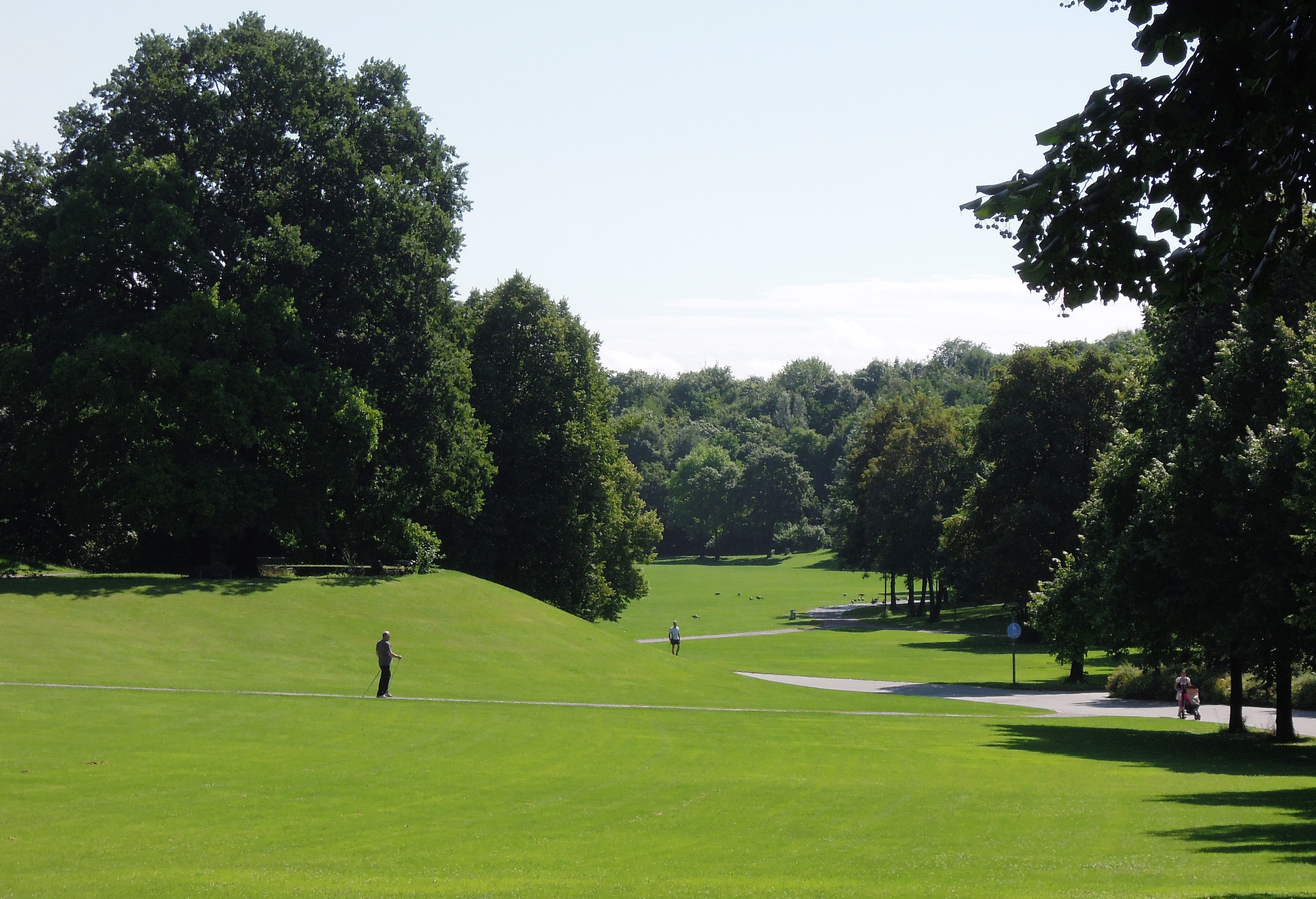 Westpark (München) - Panoramablick in den Ostteil